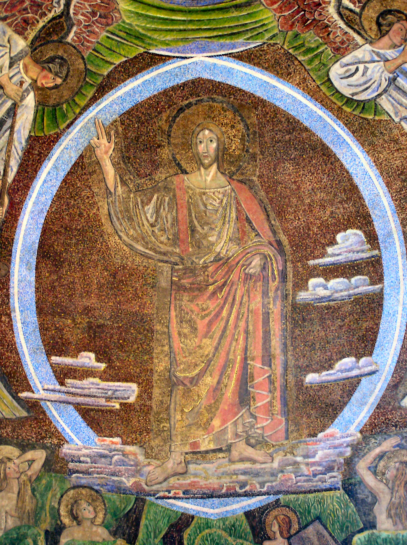 Joakim Skovgaard: Opstandelsen, karton til absismosaik i Lunds Domkirke, Malmöhus